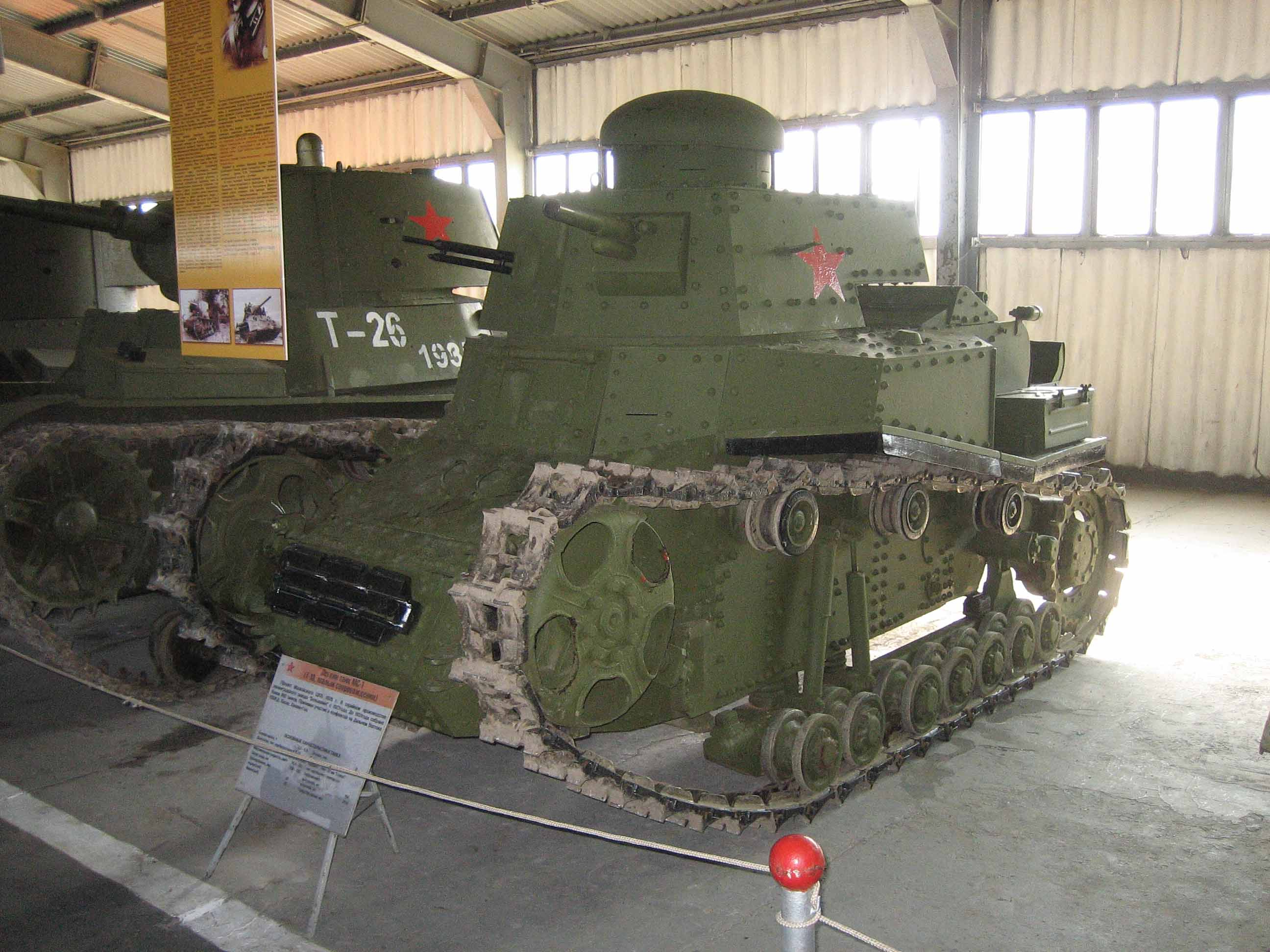 Soviet tank T-18, displayed in Kubinka Tank Museum. Data: see metadata. Source: Photo by me, User:Saiga20K.